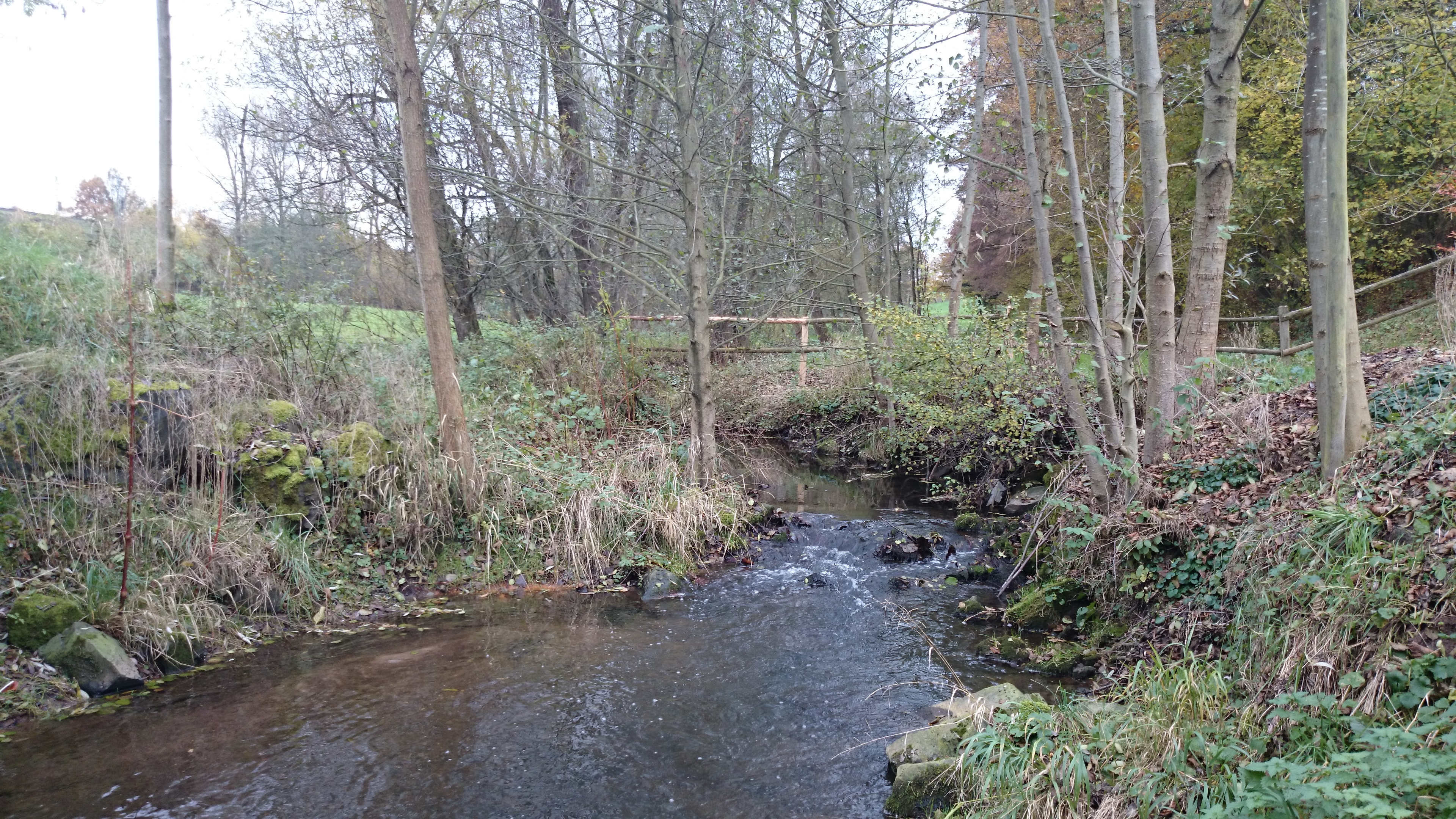 Die Fliede (Kautzer Wasser) bei der Adenmühle an der Brücke der Landesstraße 3141 zwischen Rückers und Flieden; Blick flussaufwärts